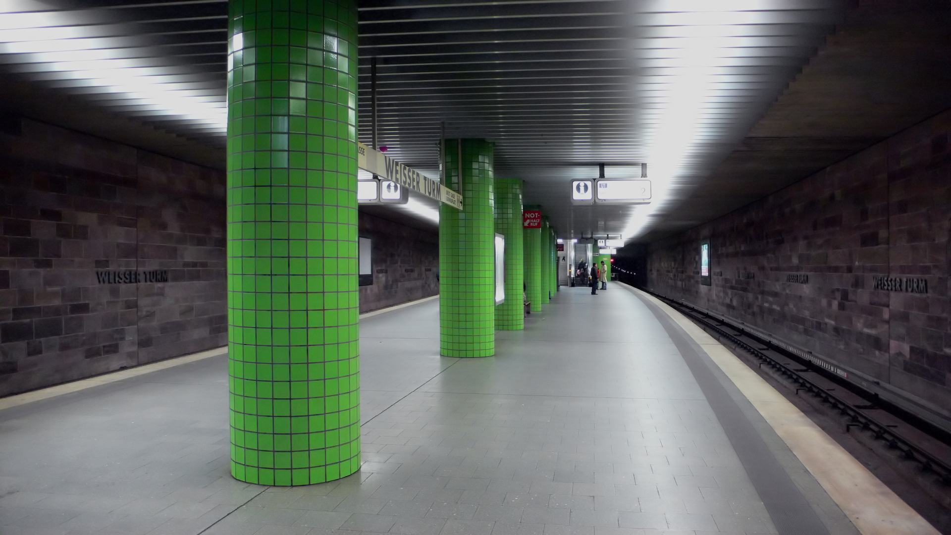 U-Bahnhof Weißer Turm der U-Bahn Nürnberg, Bahnsteigebene, Blick von Südwesten